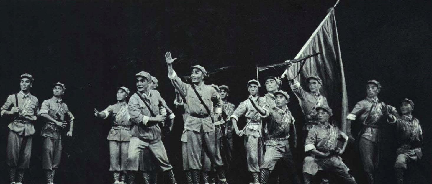 1964-09 1964年 强渡大渡河